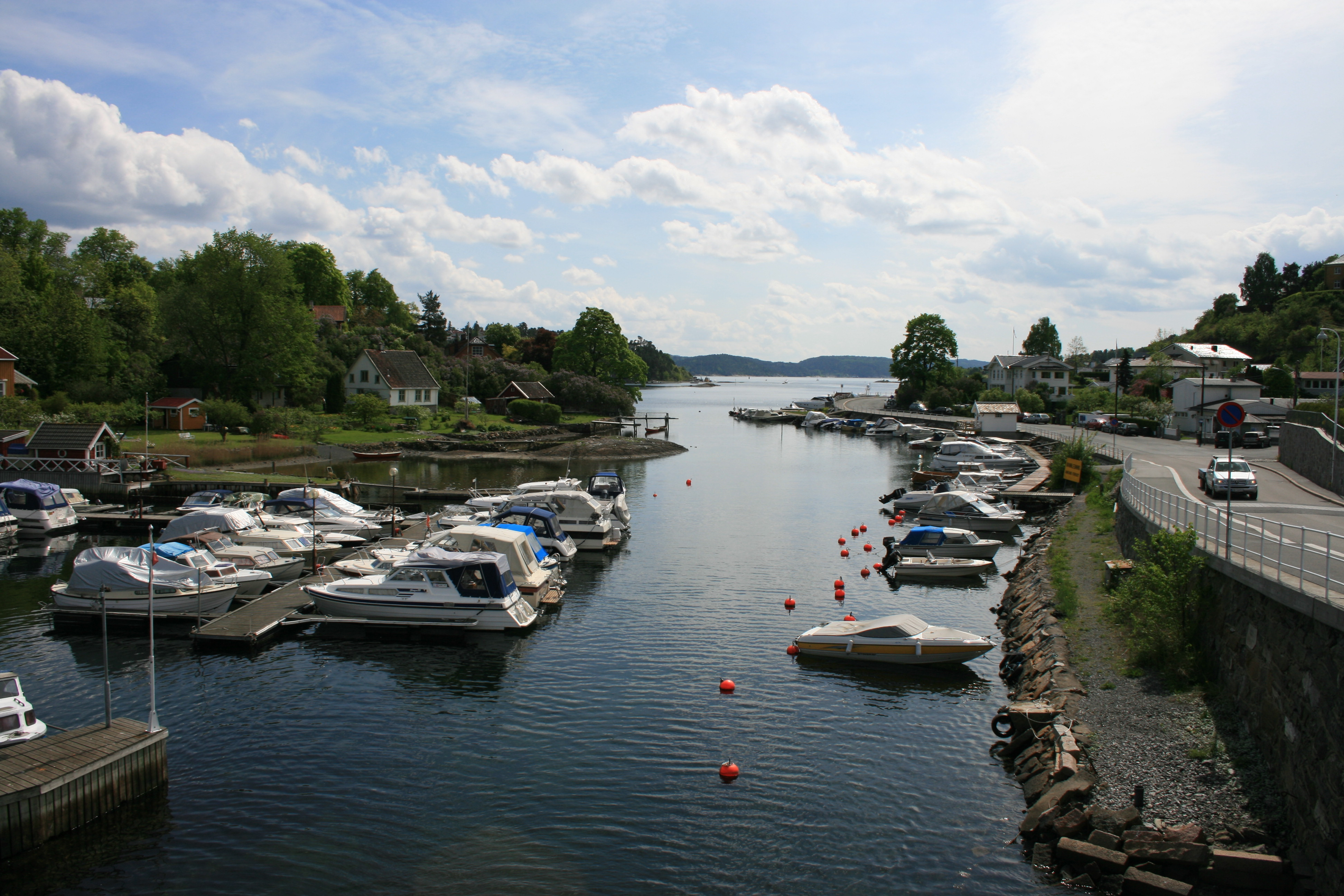 Ormsund er sjøområdet mellom Ormøya og Bekkelaget nord for Ormsundbrua i Oslo. Sør for brua heter sundet Grønnsund.